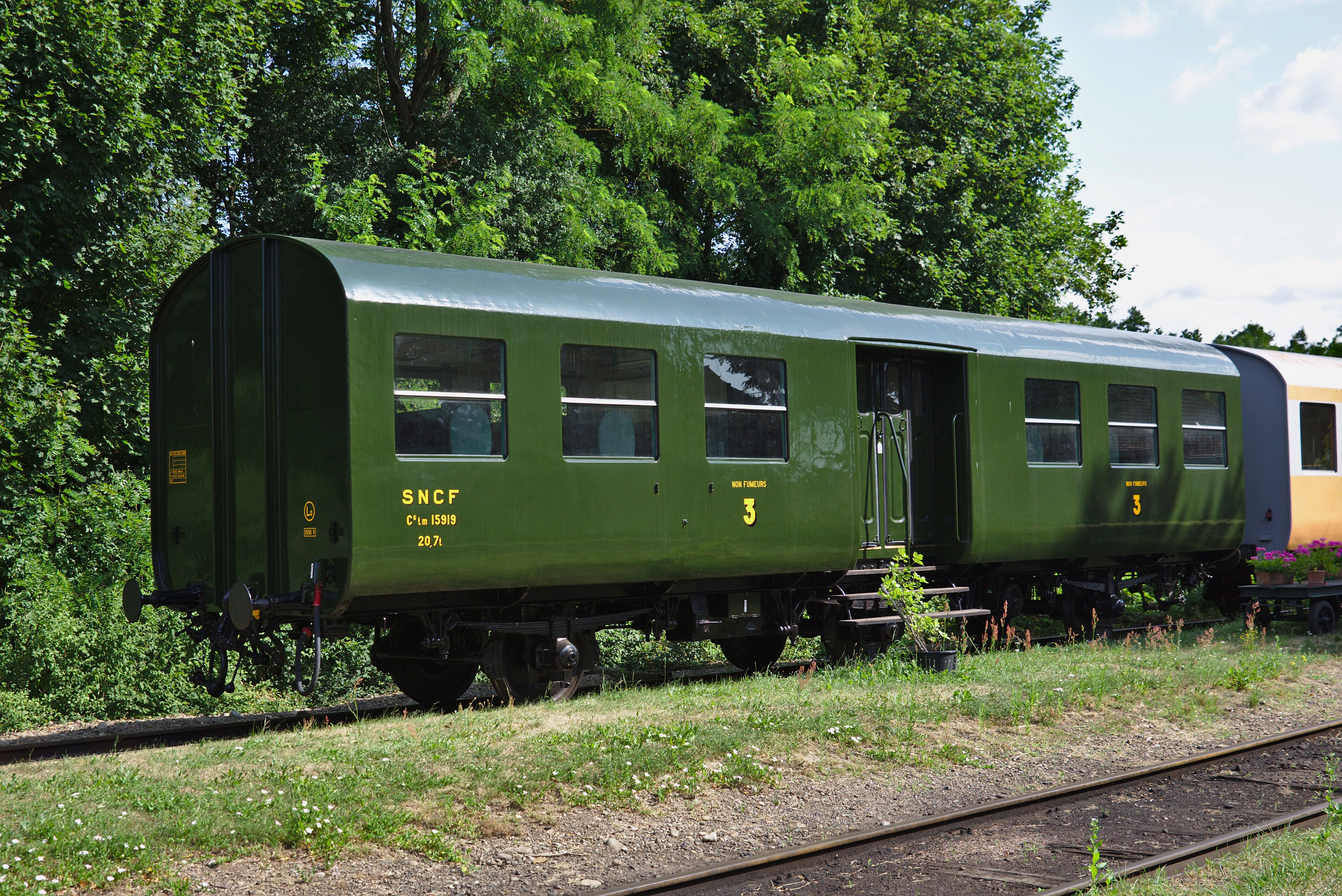 Voiture 3 pattes C6 rénovée par le chemin de fer Thur Doller en gare de Burnhaupt.